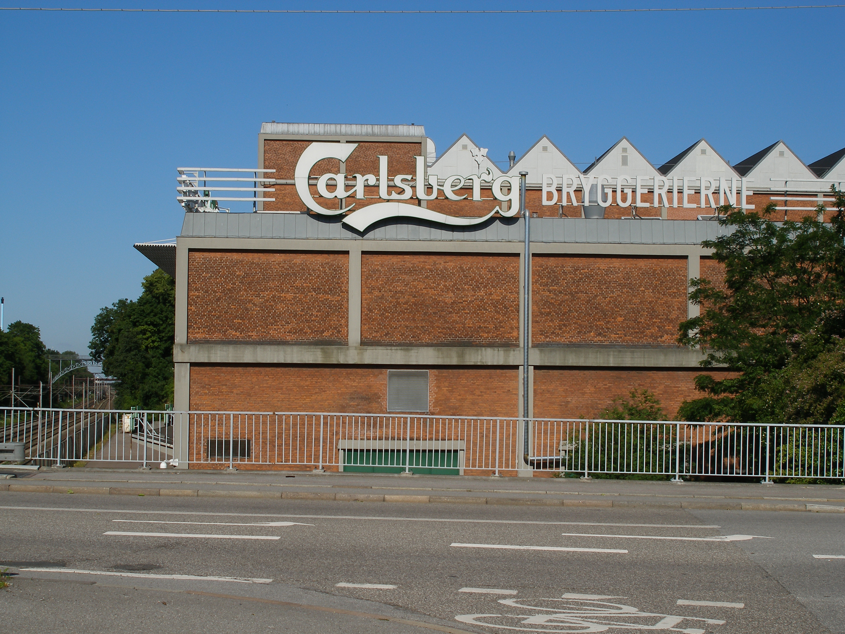 Bygningen er nedrevet. På området er nu blandt andet Carlsberg Station, taget i brug 3. juli 2016, et højhus (Bohrs Tårn) og professionshøjskolen UCC, Campus Carlsberg (Se File:Carlsberg Station opening 07.jpg)